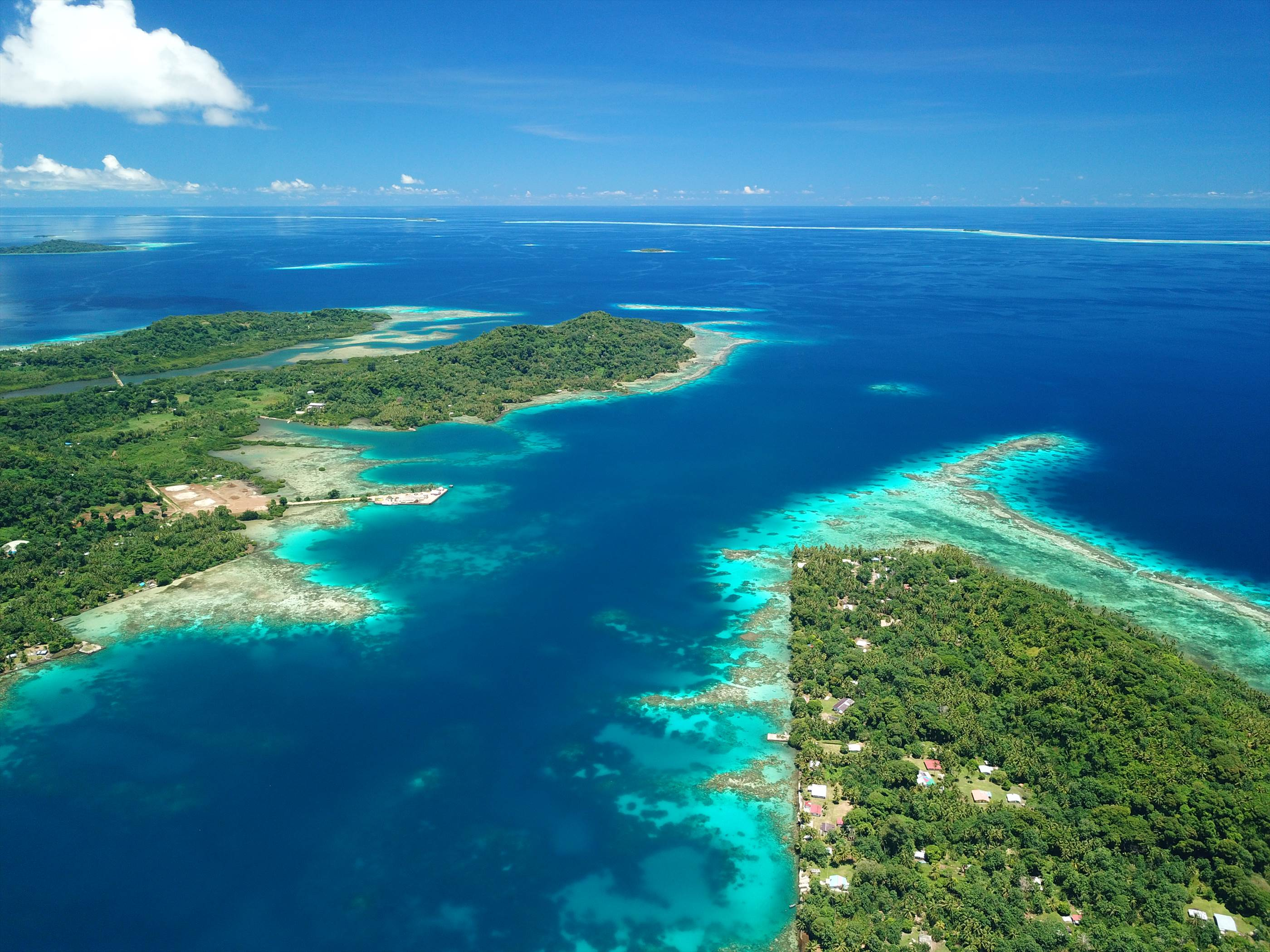 Chuuk Tonoas and Etten